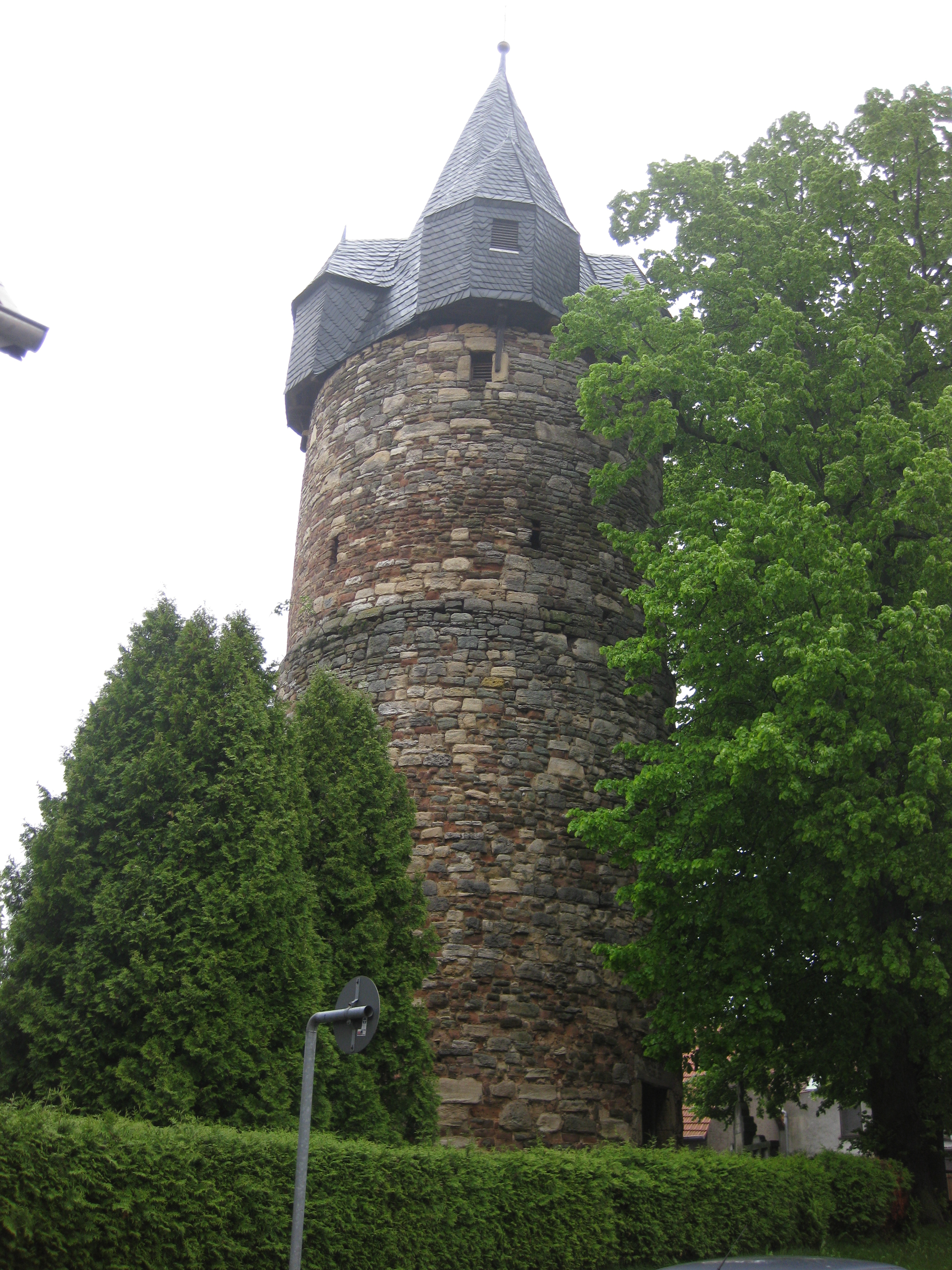 Der ehemalige Zollturm in Beuren